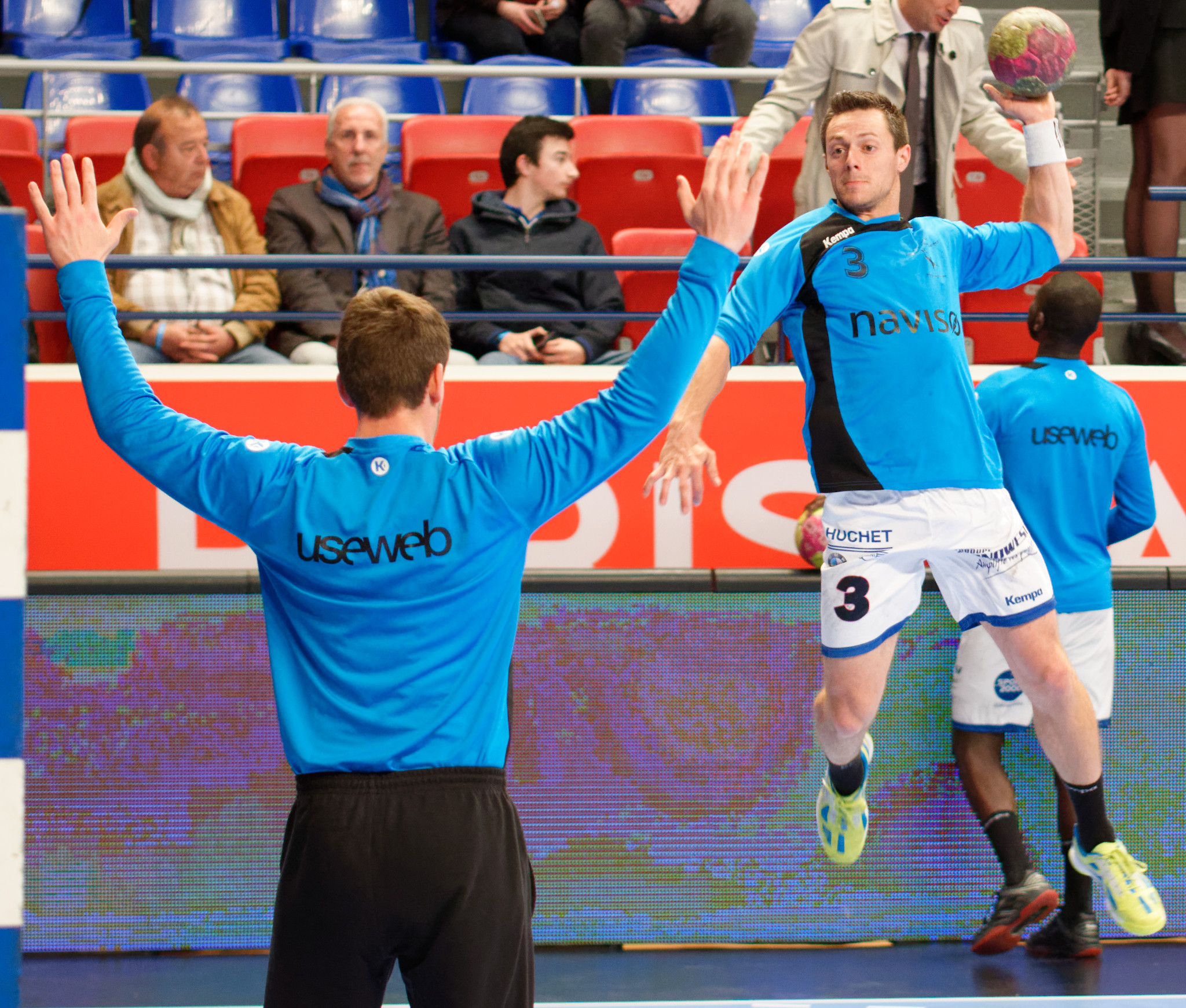 Rencontre de Championnat de LidlStarLigue entre le PSG et Cesson-Rennes Métropole. A Coubertin, le 19 avril 2017.